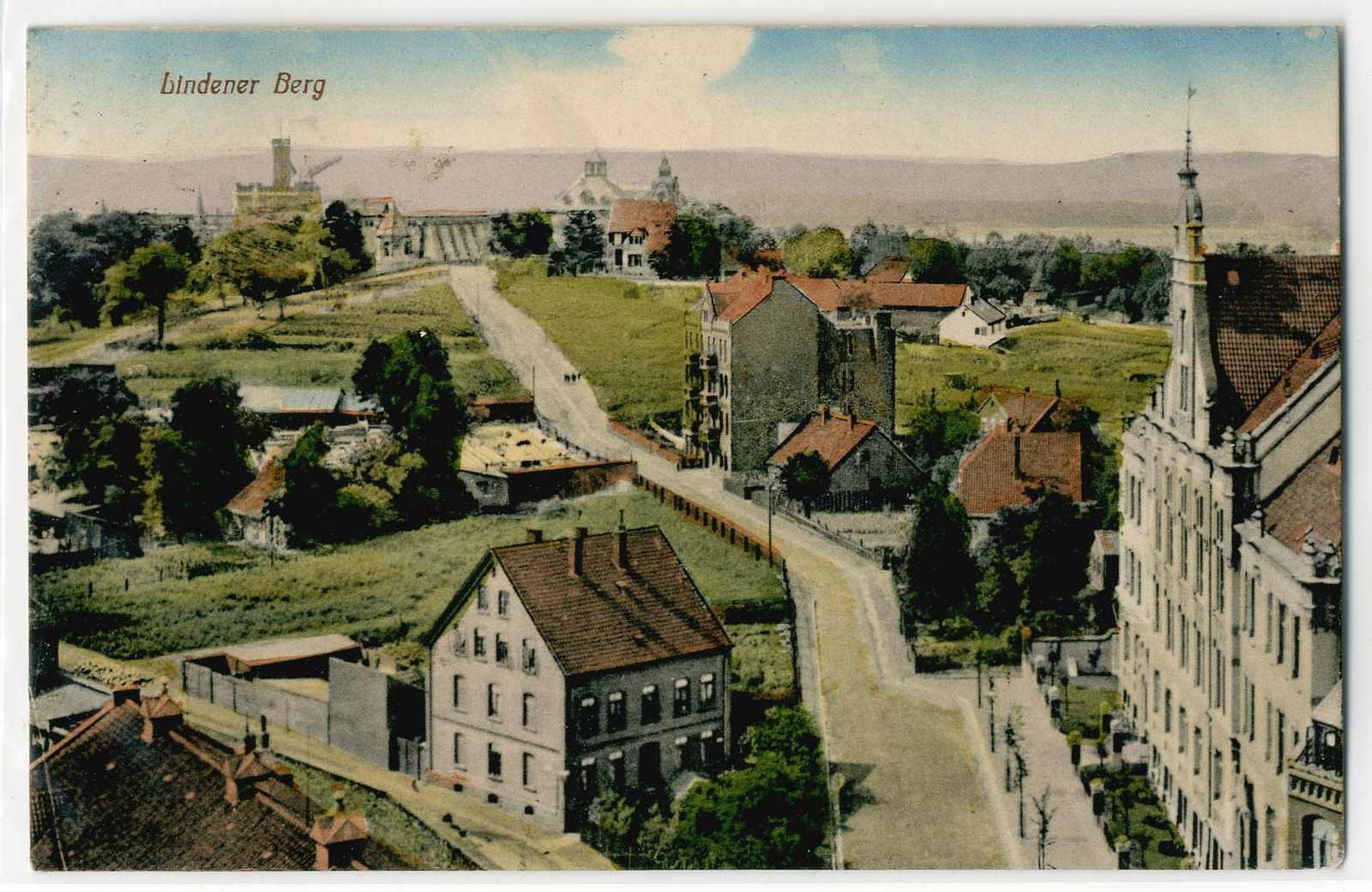 Kolorierte Ansichtskarte mit einem Blick um 1900 vom Turm der Martinskirche durch die auf den Lindener Berg hinaufführende Straße Am Lindener Berge. In der Bildmitte ist links ist das sogenannte Kalkbrennerhäuschen oder Kalkbrennerhaus von Johann Egestorff zu sehen, des Begründers der Lindener Industrie, ja der Industrialisierung des ehemaligen Königreichs Hannover und heutigen Bundeslandes Niedersachsen. Am rechten Bildrand ist die bis 1905 nach Plänen des Architekten Georg Fröhlich errichtete ehemalige Städtische Mittelschule zu sehen, heute ein denkmalgeschützzes Gebäude als Teil der IGS Linden. Am Ende der Straße ist linker Hand der Wasserhochbehälter vor der Windmühle zu erkennen, rechts davon die Türme der Villa Osmers und das später vom Jazz Club Hannover genutzte Gebäude. Im Hintergrund zieht sich quer durch das Bild der langgestreckte Deister.